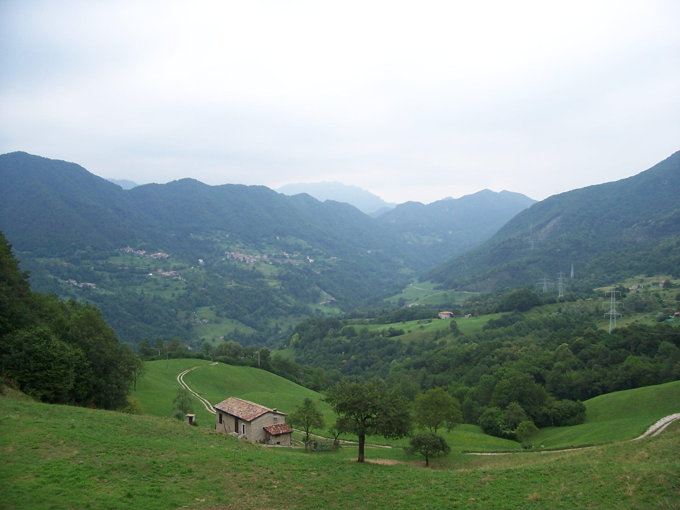 Costa di Gargnano (brescia)